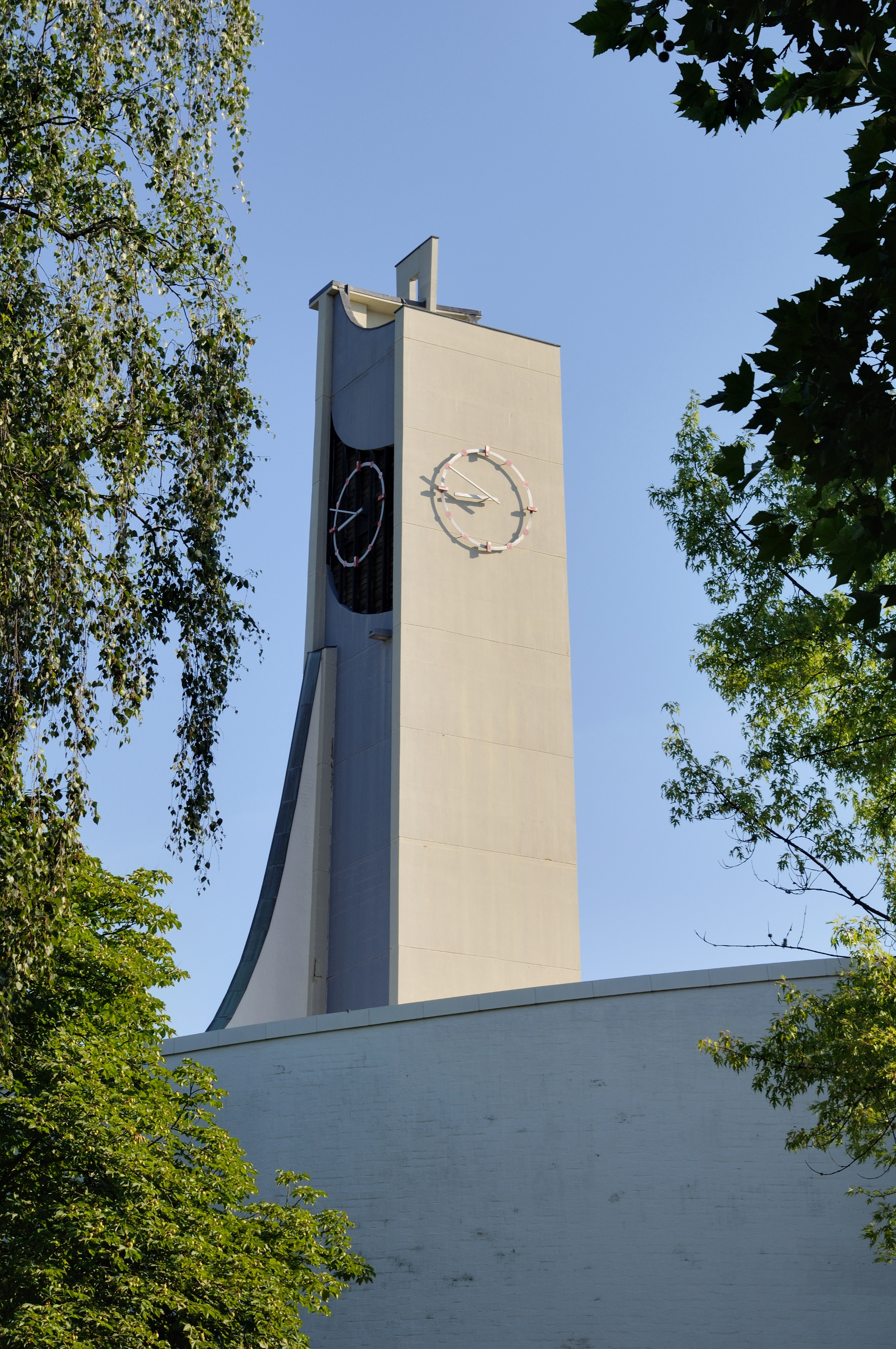 Lörrach: St. Peter (Glockenturm)